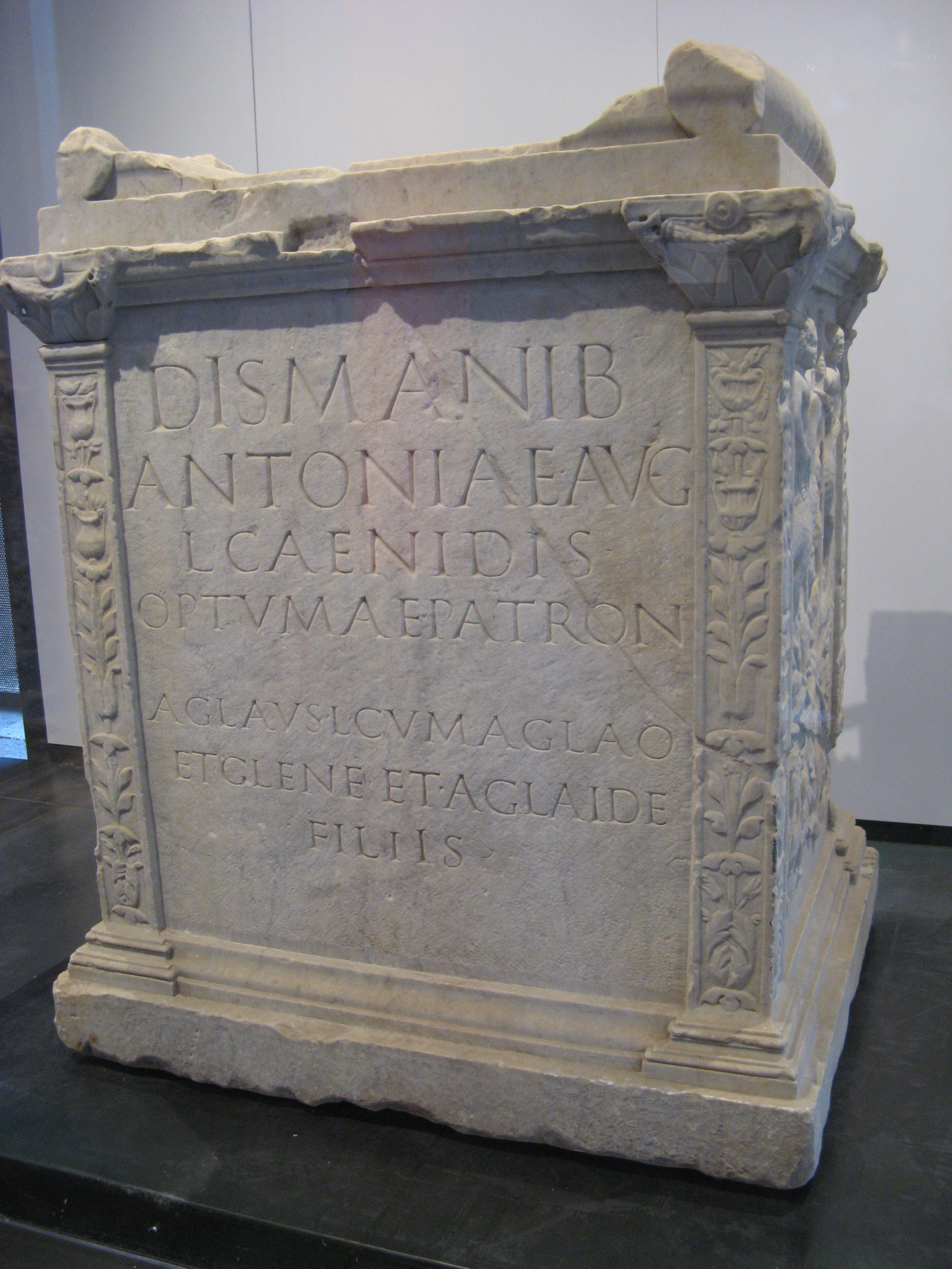 Inscription de Rome trouvée vers Porta Pia. Il s’agit de l'autel funéraire de la maîtresse de l'empereur Vespasien, Caenis, affranchie d'Antonia. Le texte latin est «Dis manib(us) / Antoniae Aug(ustae) / l(ibertae) Caenidis, / optumae patron(ae), / Aglaus l(ibertus) cum Aglao et Glene et Aglaide / filiis. » (Aux dieux mânes d’Antonia Caenis, affranchie de l’Augusta (Antonia), très bonne patronne, Aglaus son affranchi avec Aglaus, Glene et Aglaide ses enfants (ont fait faire cet autel)). Caenis est connue par Suétone, Divus Vespasianus, III. Référence de l’inscription : CIL VI, 12037.